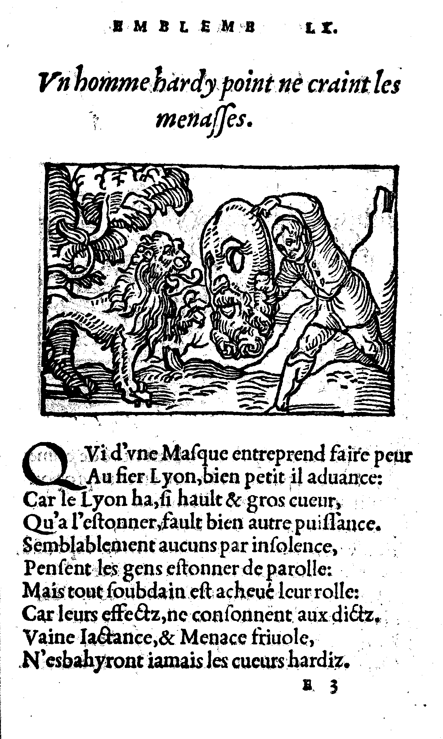 Page from the 1545 edition of "Le Théâtre des bons engins" by French Renaissance humanist Guillaume de La Perrière (ca 1499 - ca 1565)